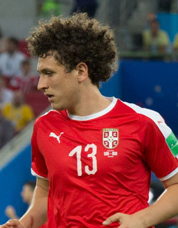 Сборная Бразилии оставляет Сербию за бортом ЧМ-2018 и выходит в плей-офф